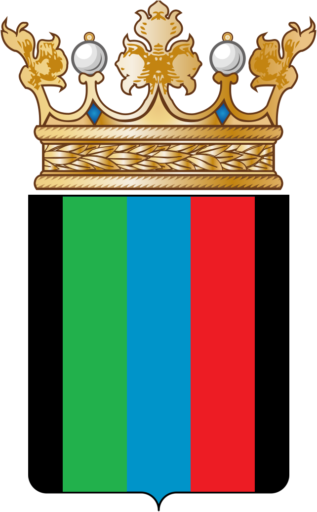 palato di nero ai lati, di verde, d'azzurro e di rosso